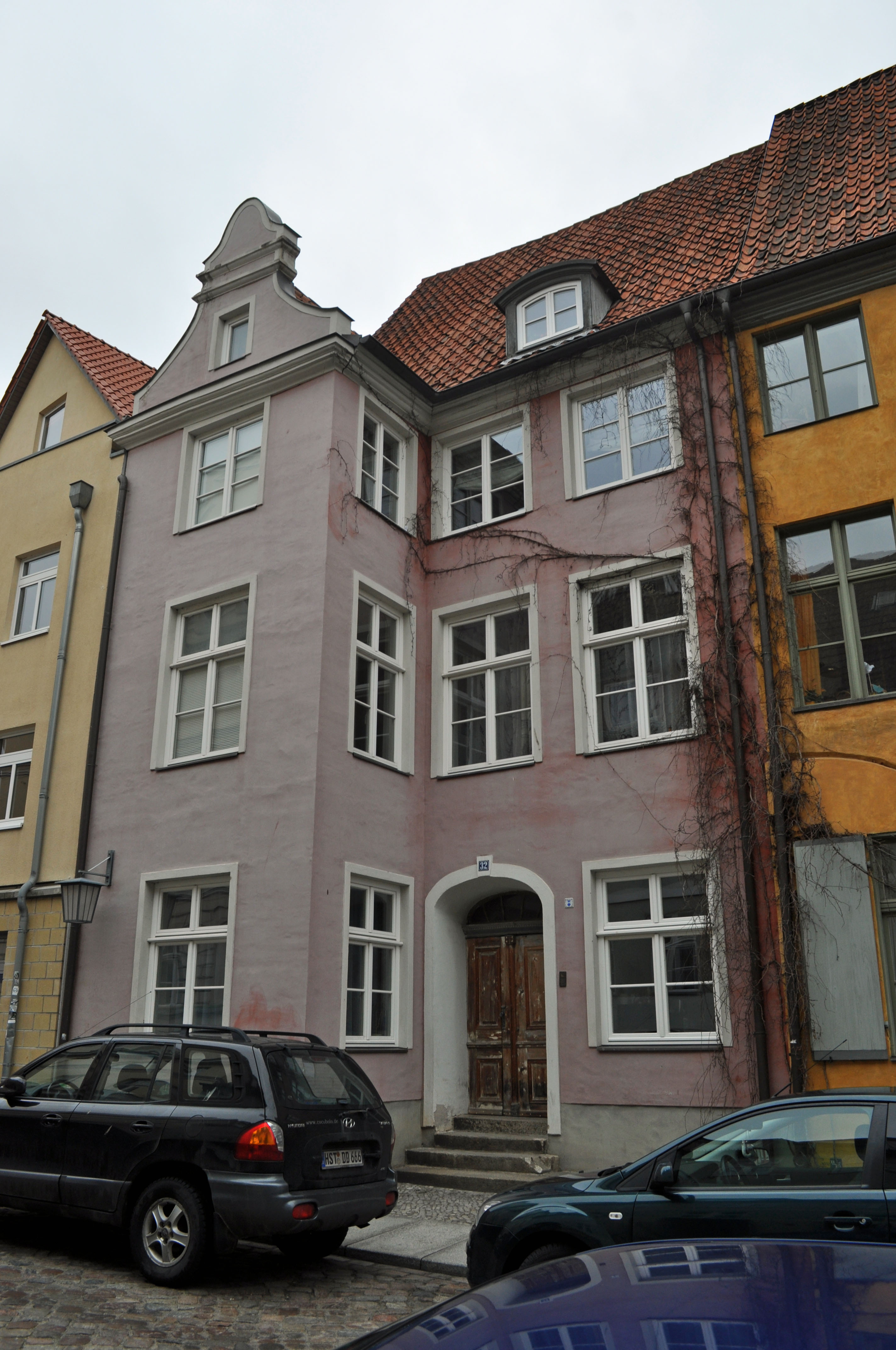 Gebäude bzw. Gebäudedetail in Stralsund. Straße und Hausnummer siehe Dateiname.